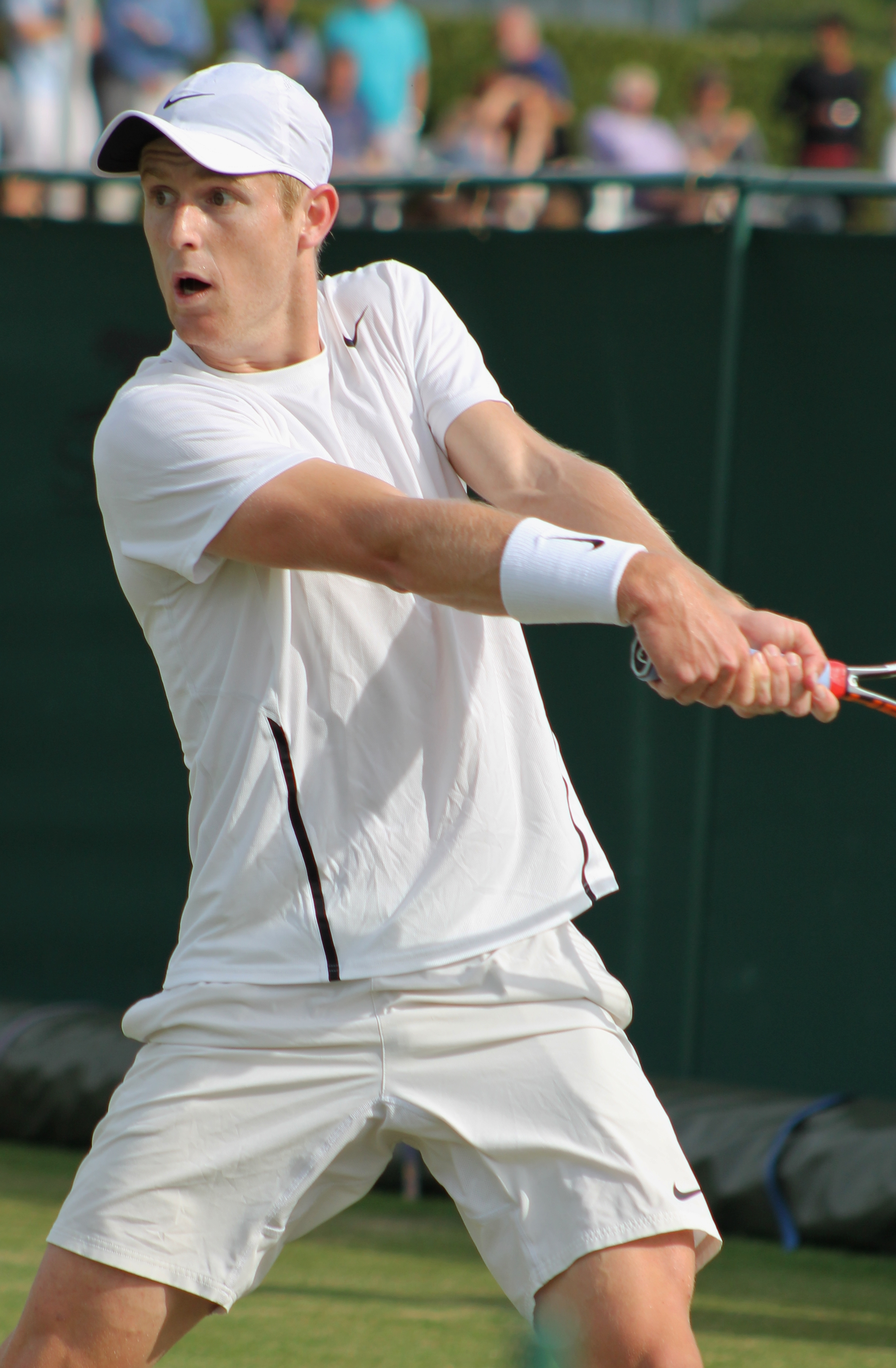 Saville WMQ14 (18)